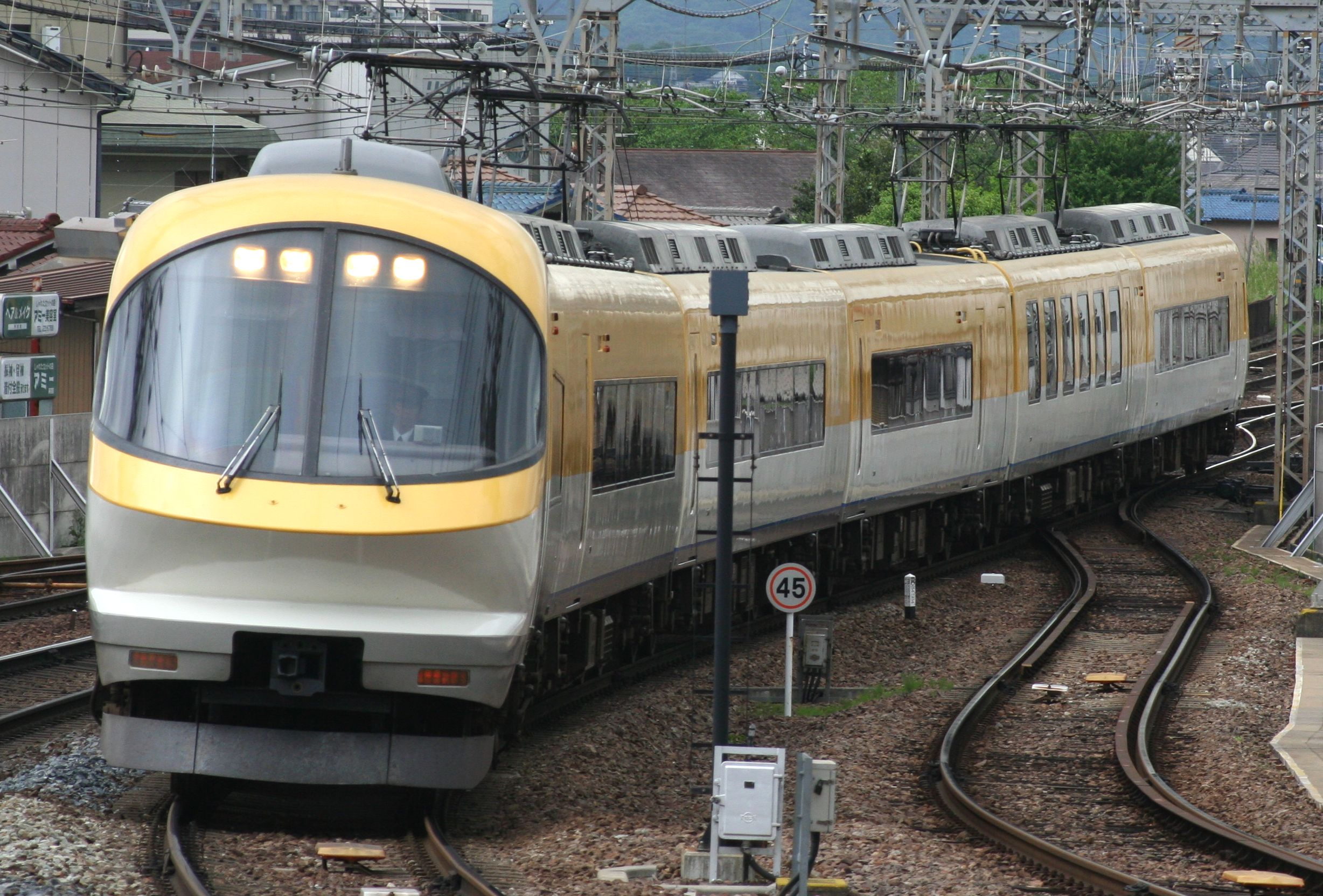 近鉄23000系電車